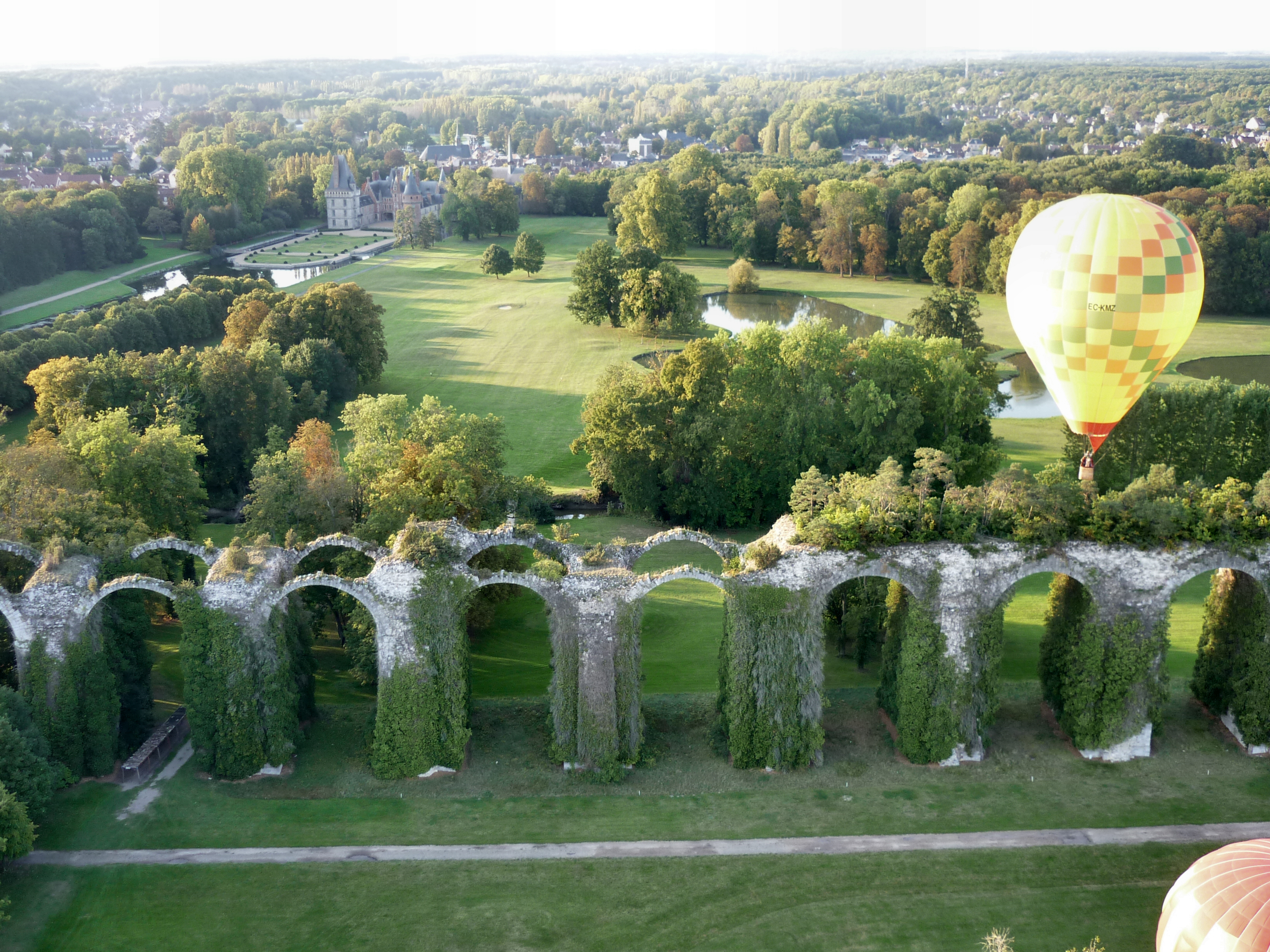 This building is en partie classé, en partie inscrit au titre des Monuments Historiques. .